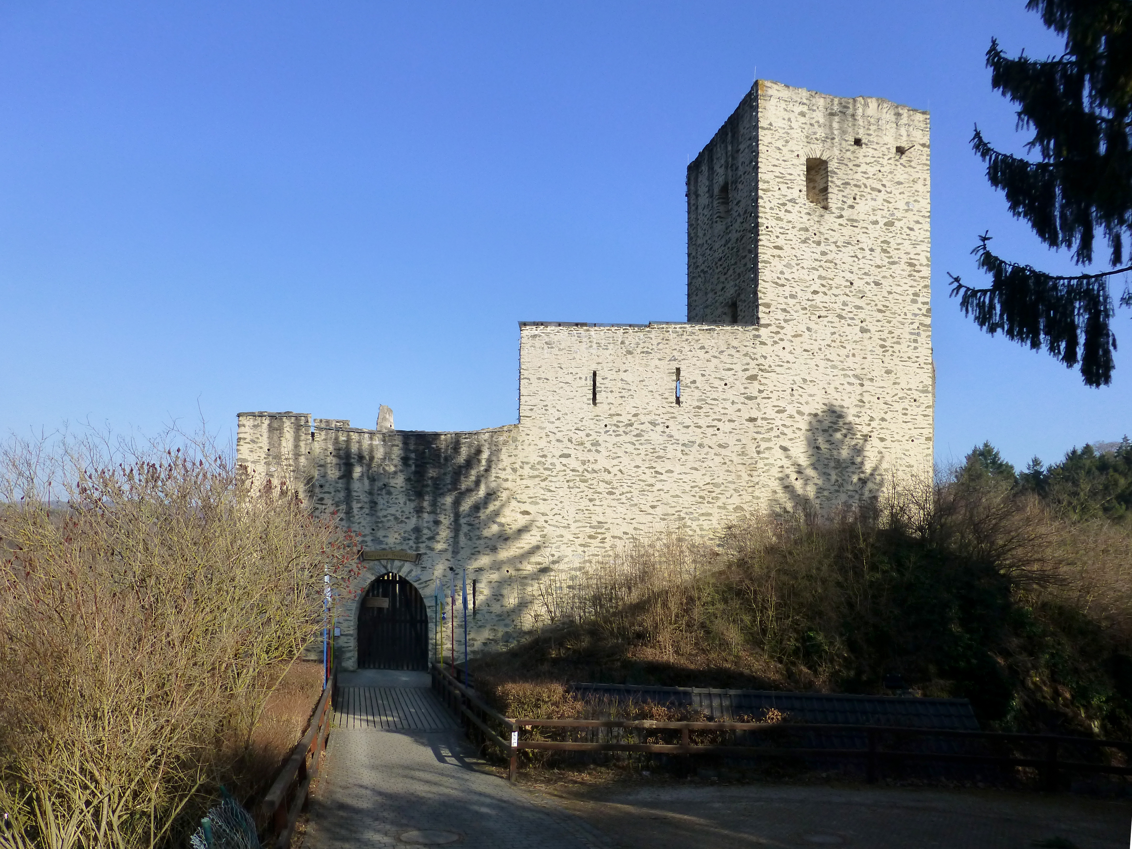 Burg Freienfels von der Zugangsseite